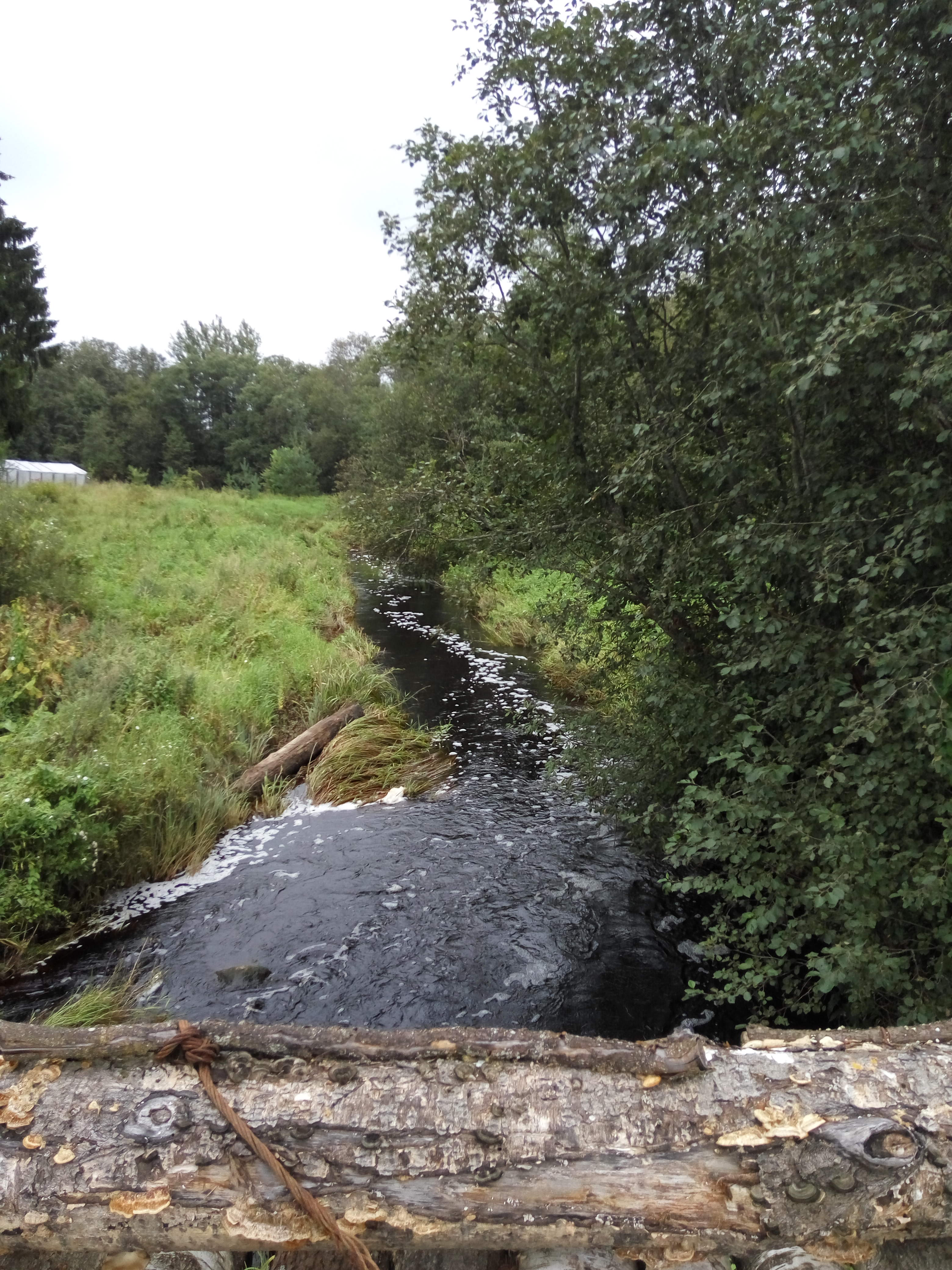 речка Глушица